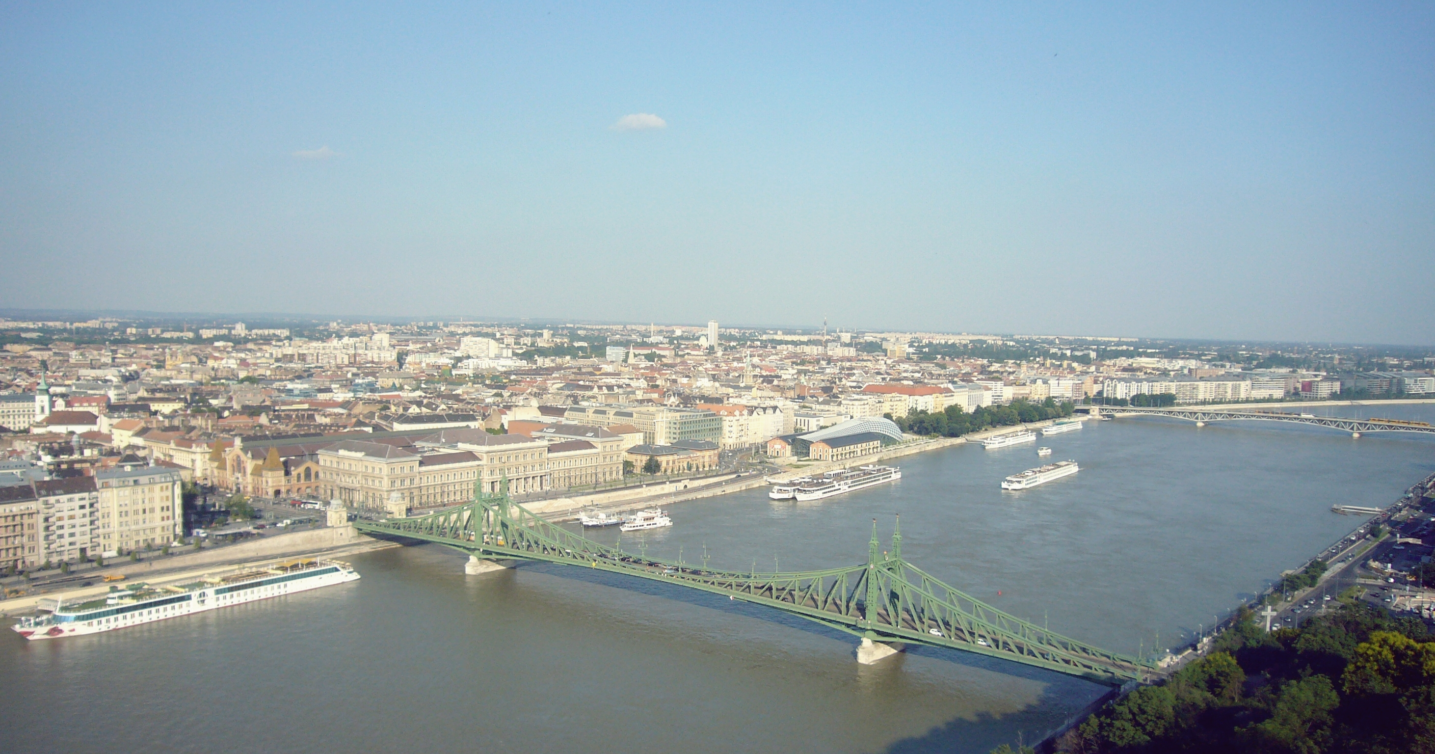 A budapesti Szabadság híd a Gellért-hegyről